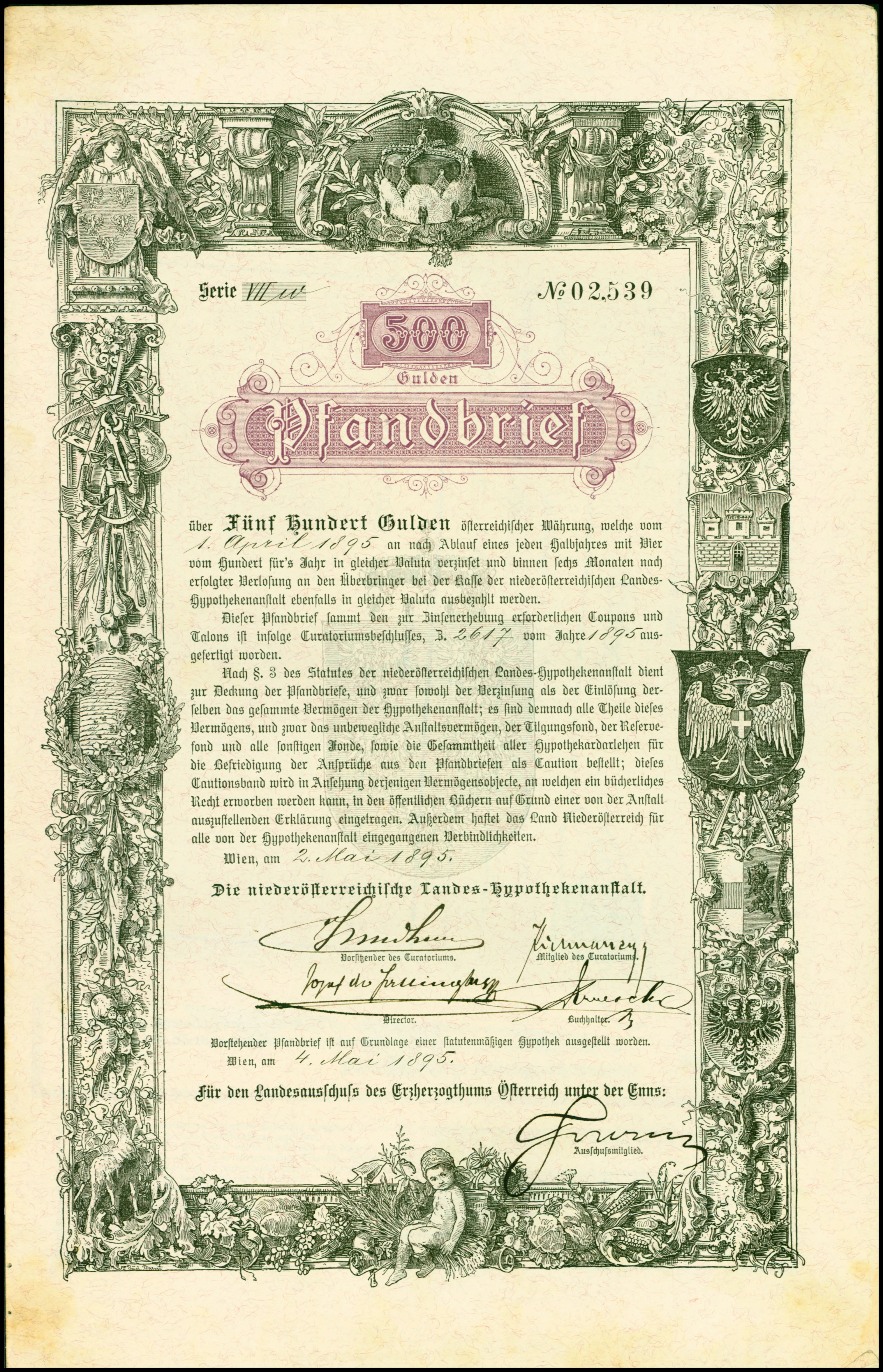 Pfandbrief über 500 Gulden der Niederösterreichische Landes-Hypothekenanstalt von 1895; aus dem Fundus des Ersten Deutschen Historic-Actien-Museum e.V. (EDHAM), Kürnbach